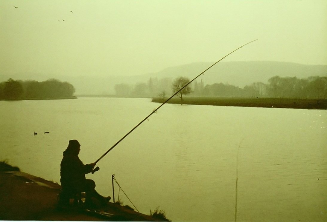 Mülheim, Angler an der Ruhr - OpenStreetMap(Info)